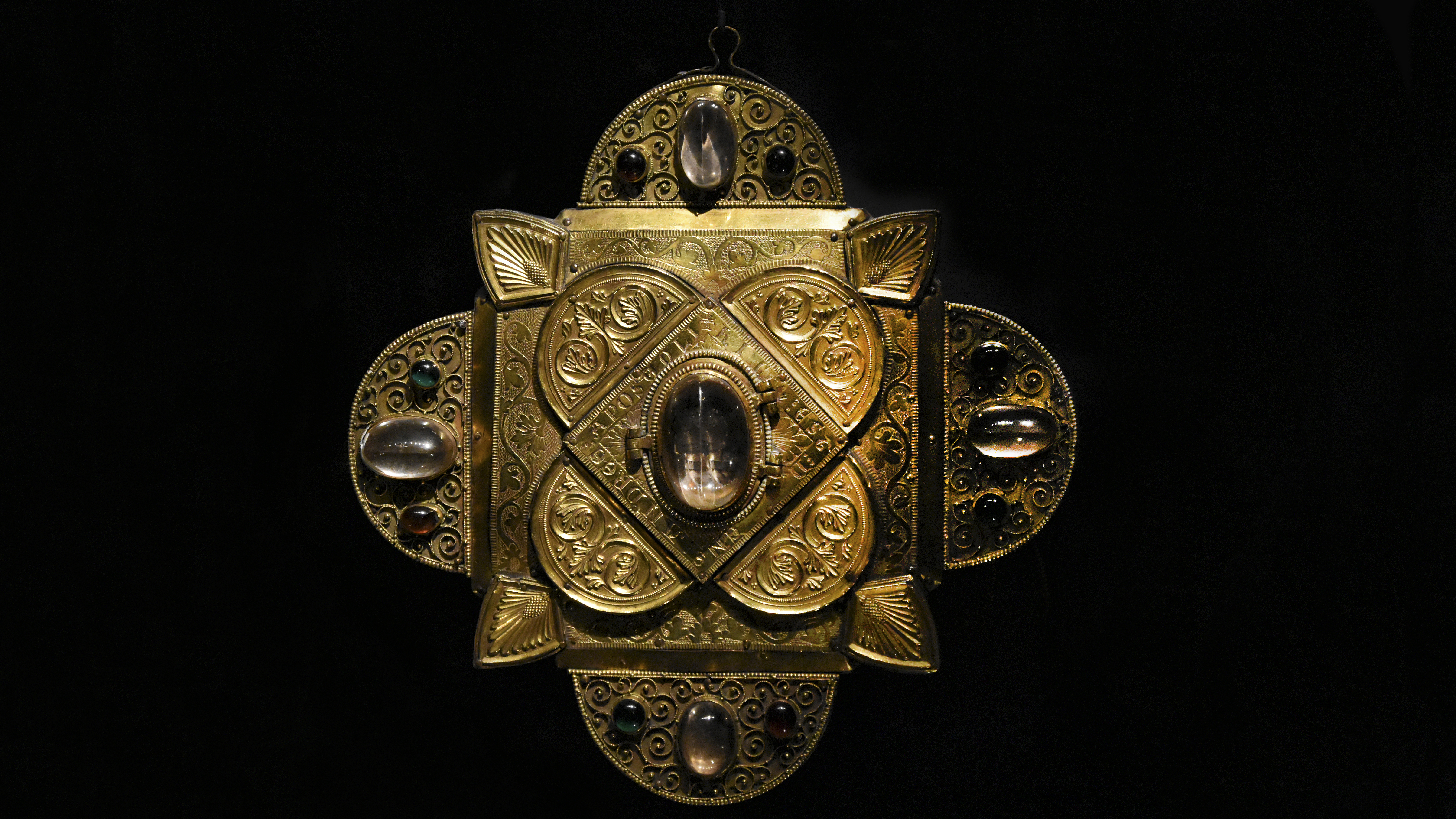 Fylacterion van de tand van de Heilige Andreas - Kerkschat van Oignies, Musée provincial des Arts anciens du Namurois, Namen